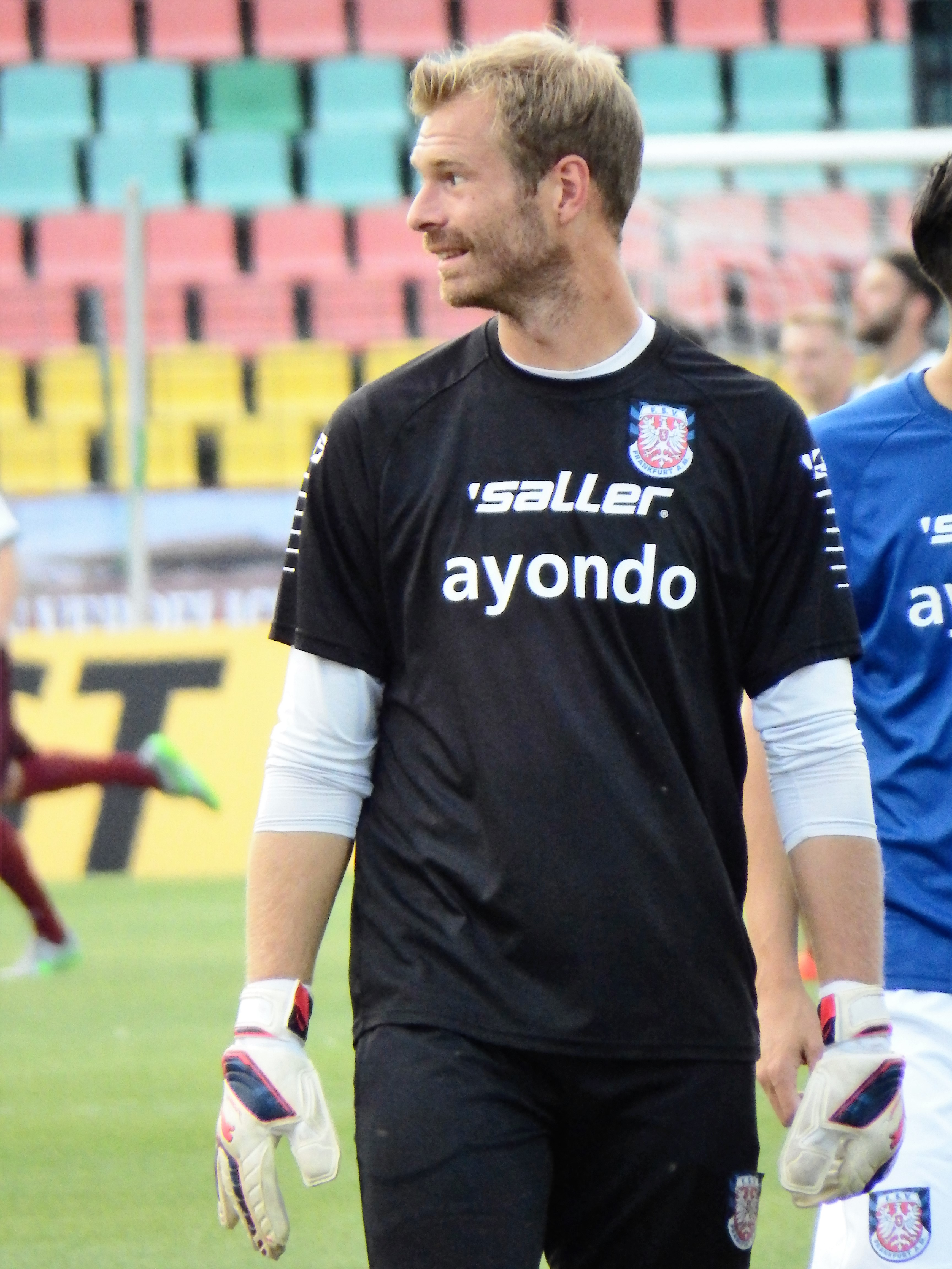 Pirson, Sören FSV Frankfurt 15-16